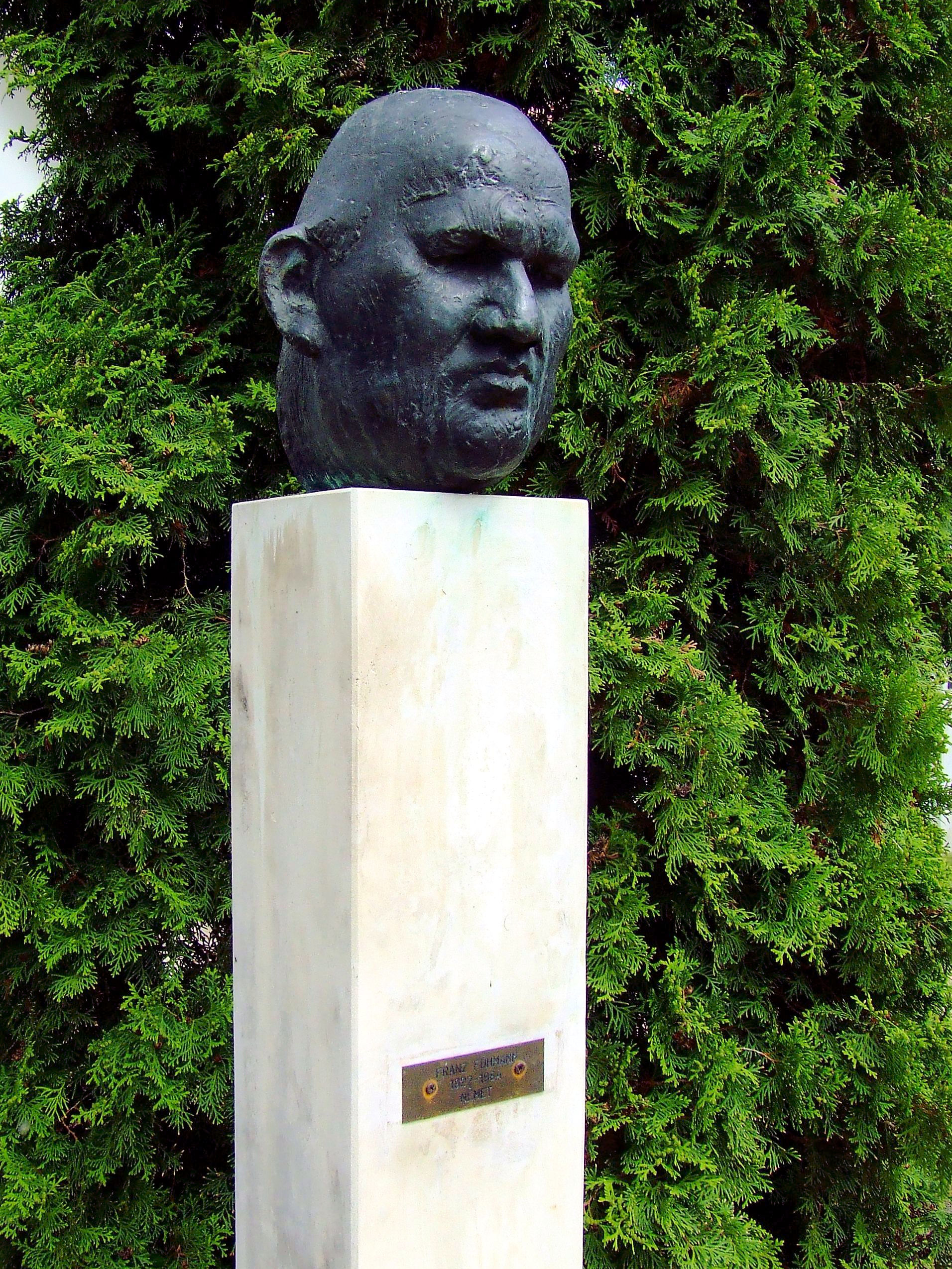 Franz Fühmann (1922-1984) német író szobra Kiskőrösön, Petőfi fordítóinak szoborparkjában. Wieland Förster (*1930) szobrászművész alkotása (1989). Forrás:[1]